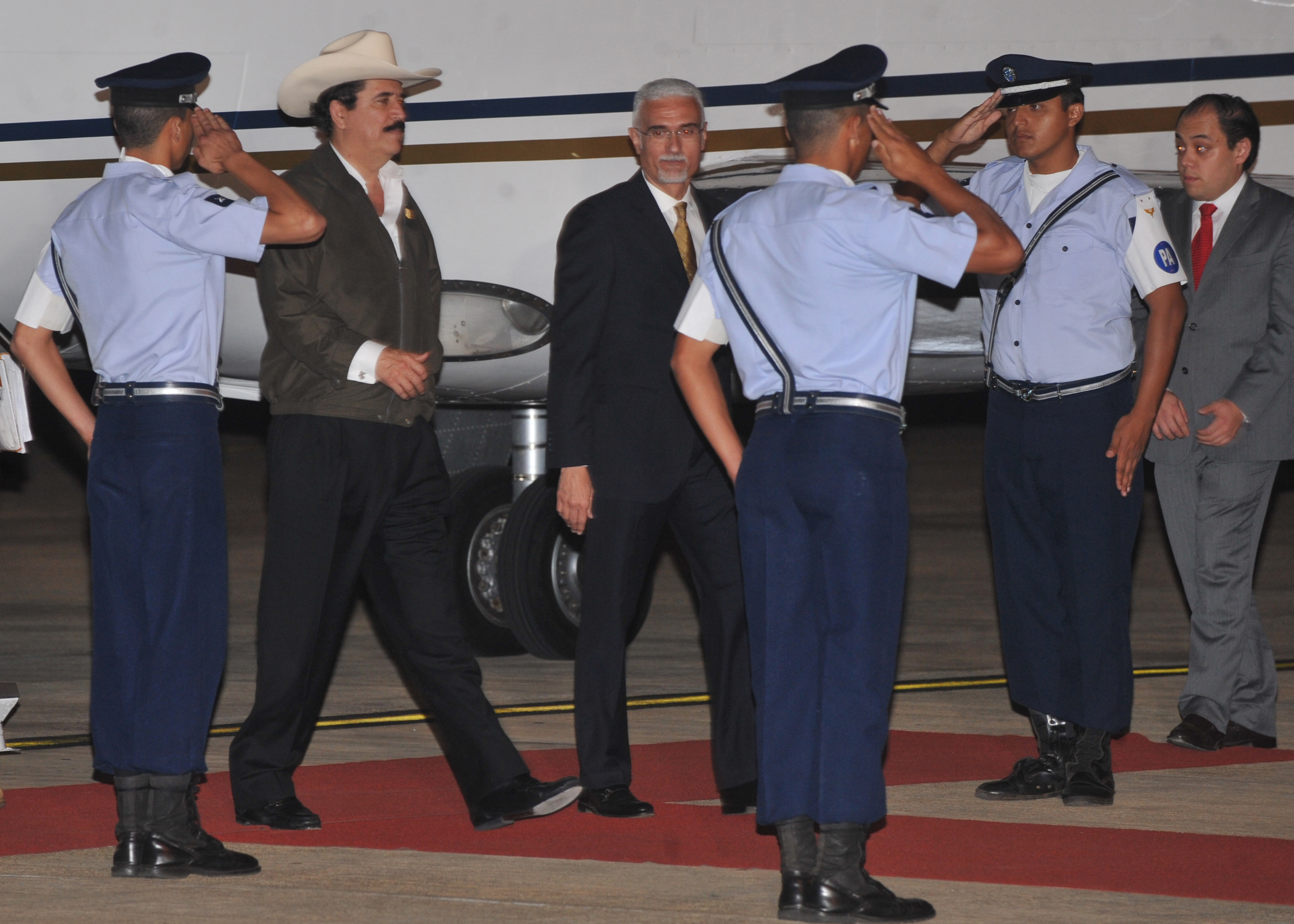 O presidente deposto de Honduras, José Manuel Zelaya, chega à Base Aérea de Brasilia, concede entrevista sobre a situação em seu país.